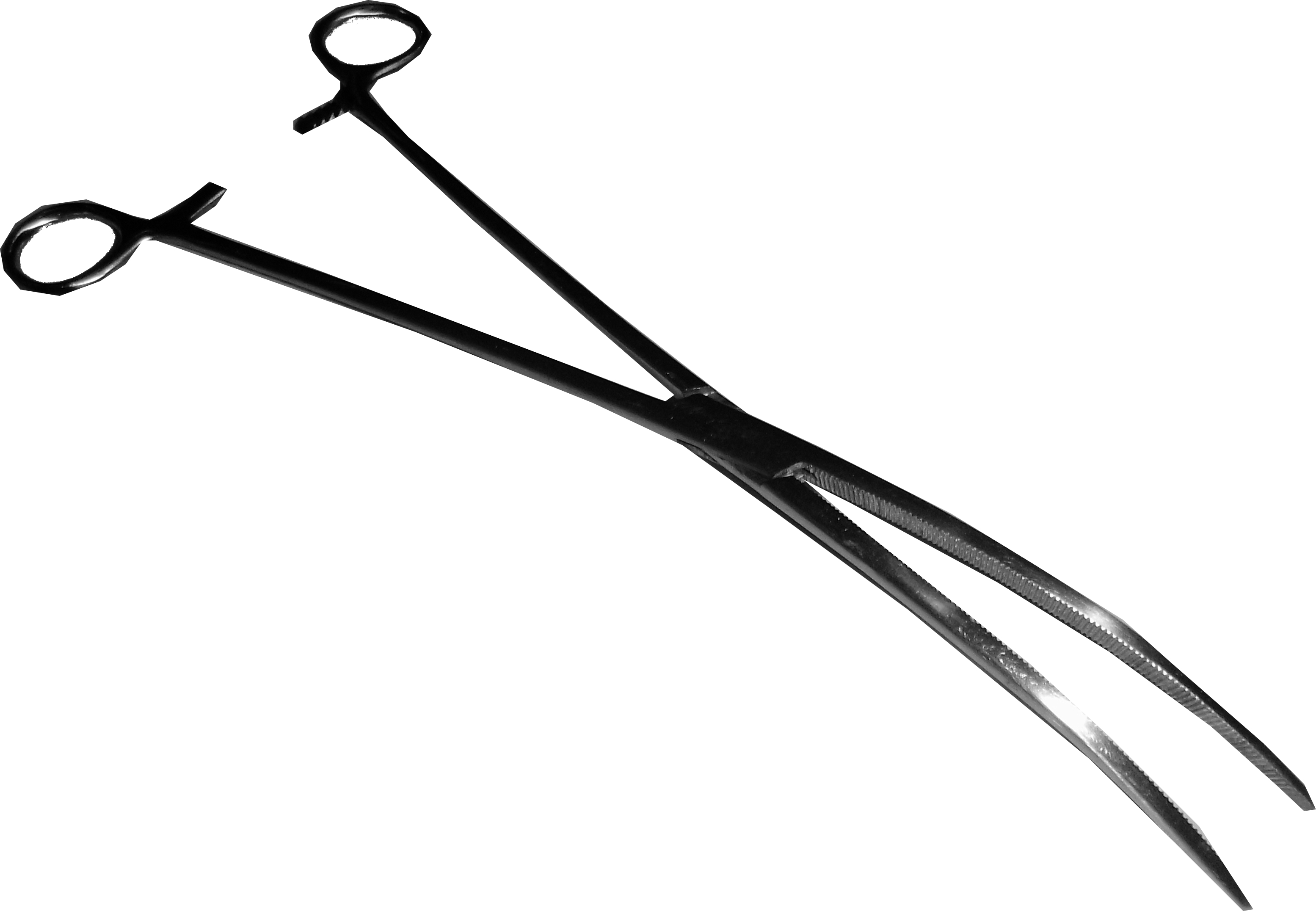 Een voedertang